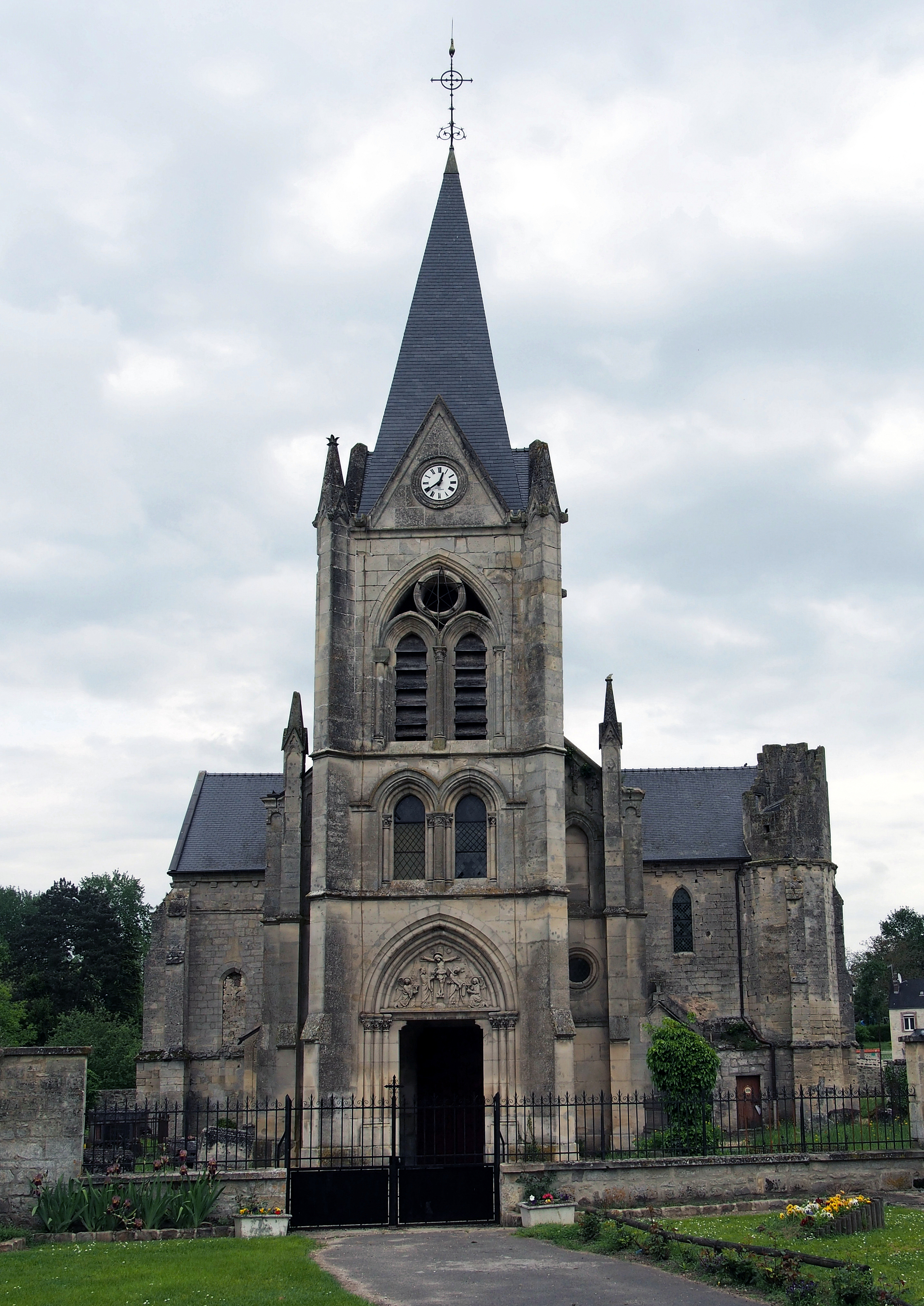 Église Saint-Nicolas de Laval-en-Laonnois, (Classé, 18 janvier 1921) .